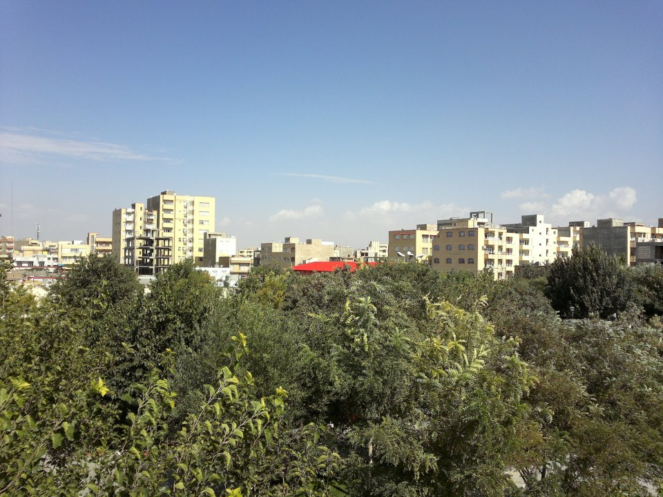 نمایی از محله‌ی شنب غازان